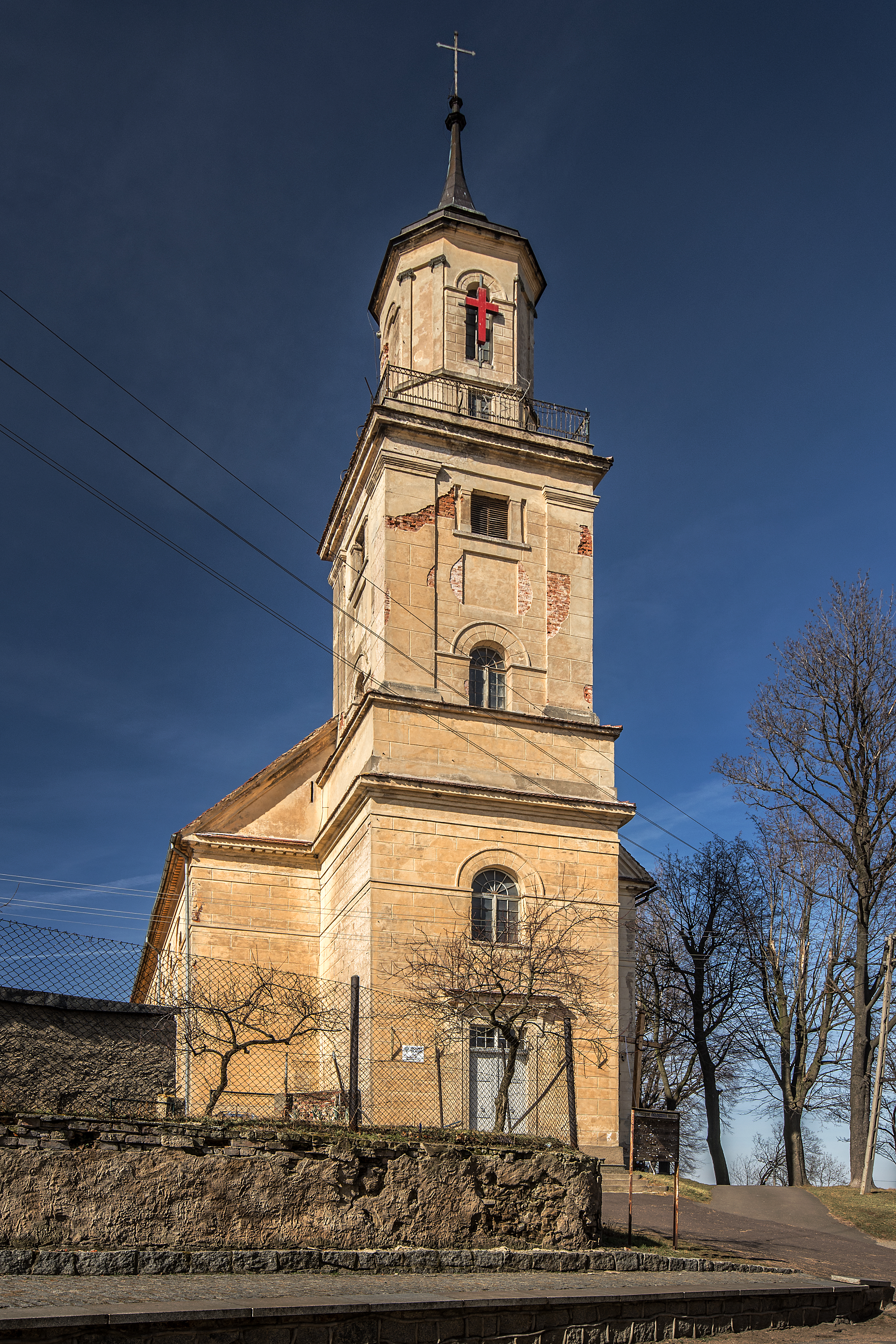 Dobromierz, kościół ewangelicki, ob. rzym.-kat. pom. p.w. śś. Piotra i Pawła, 1 poł. XIX